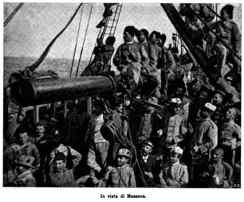 In vista di Massaua